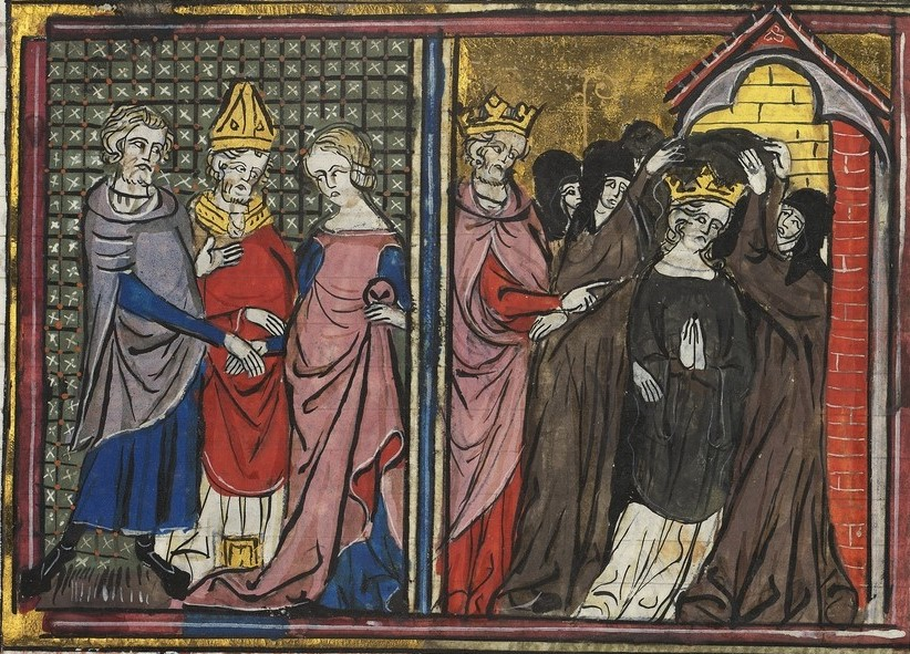 Mariage de Bohémond Ier et Constance de France et répudiation d'Arda